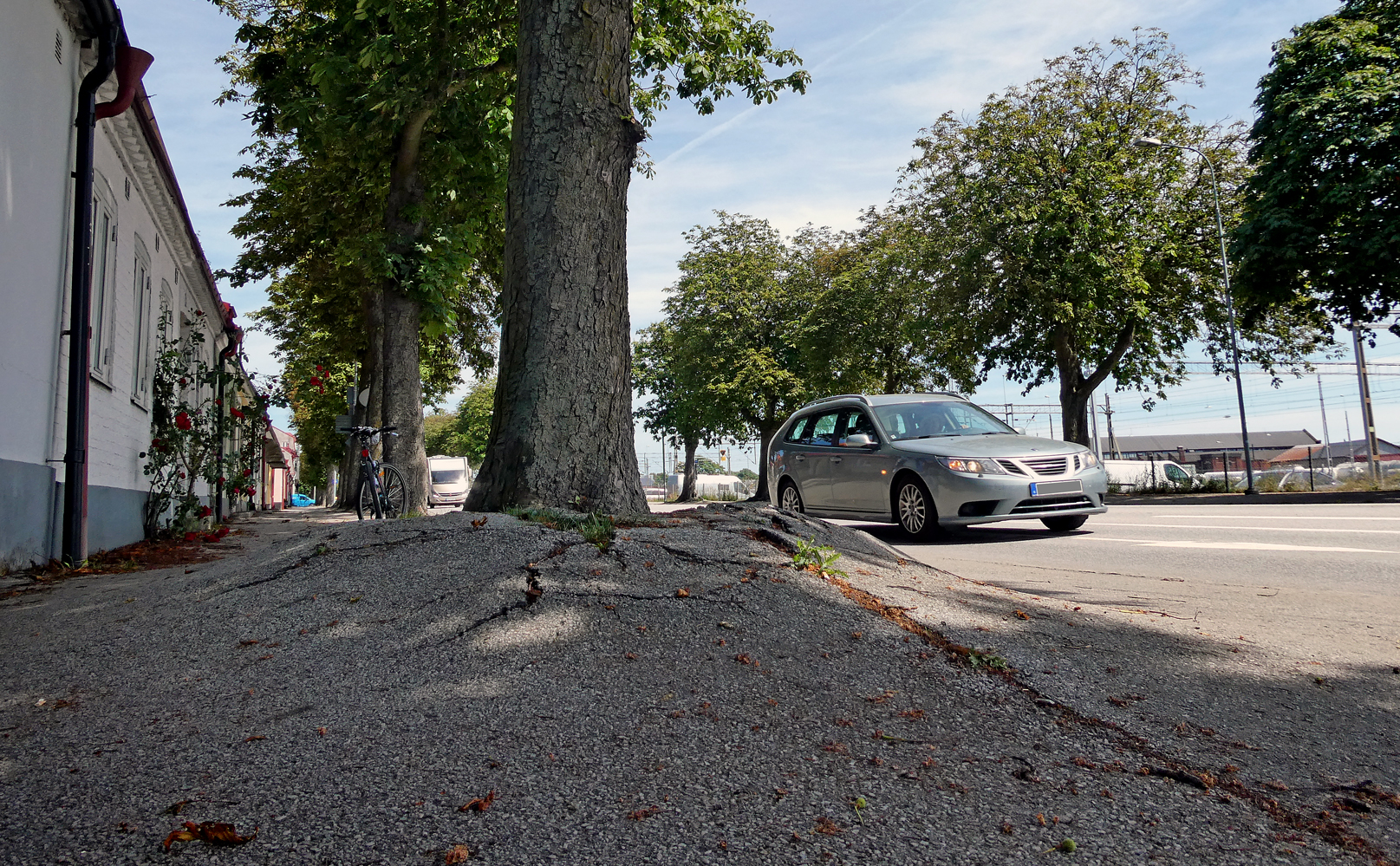 Kraften i växande rötter kan vara mycket hög, på bilden har en Kastanjs rötter spräckt asfalten på en gångbana och runt stammen höjt den ca 40 cm. Österleden i Ystad 2020.